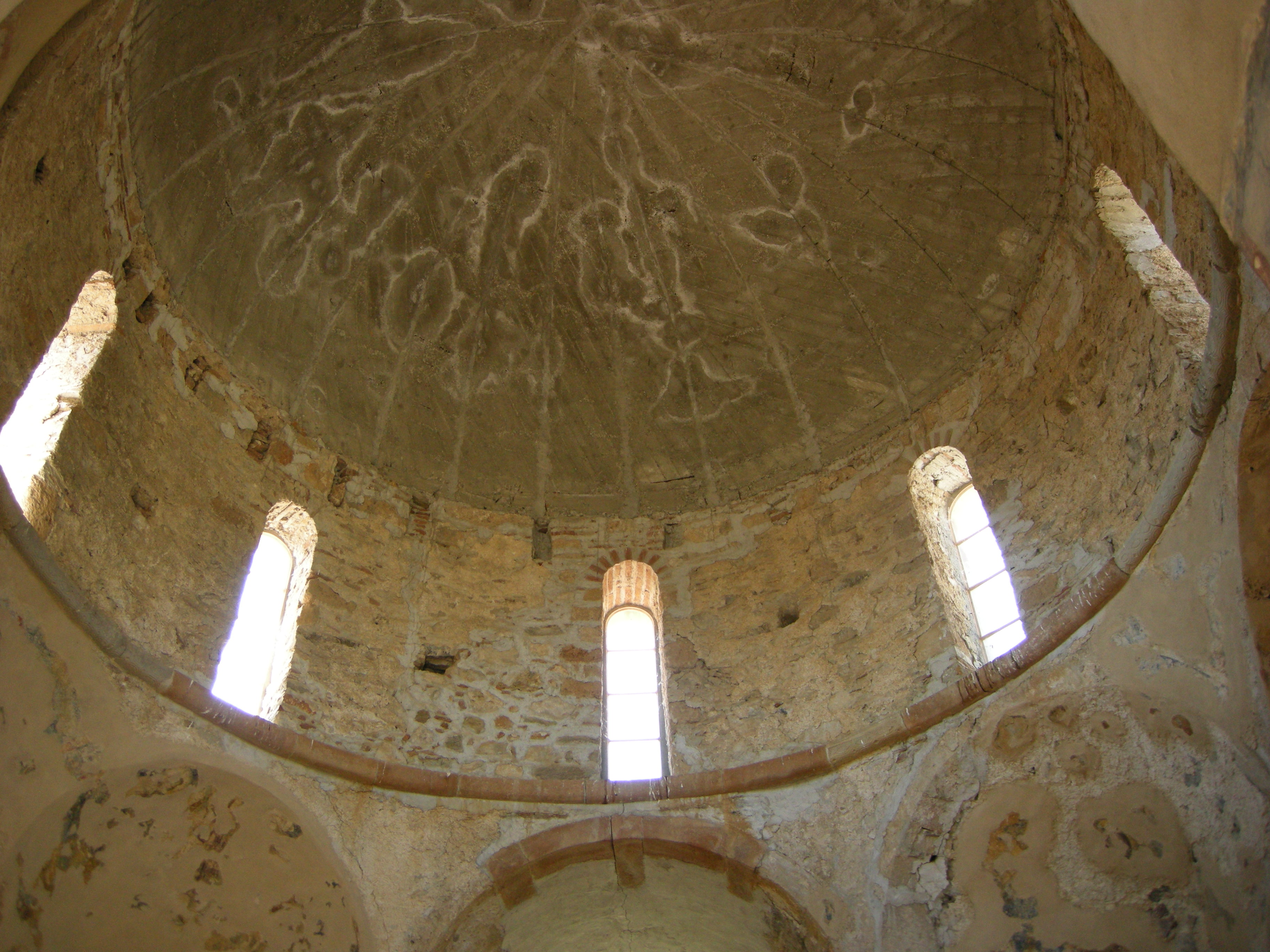 Agioi Theodoroi dome